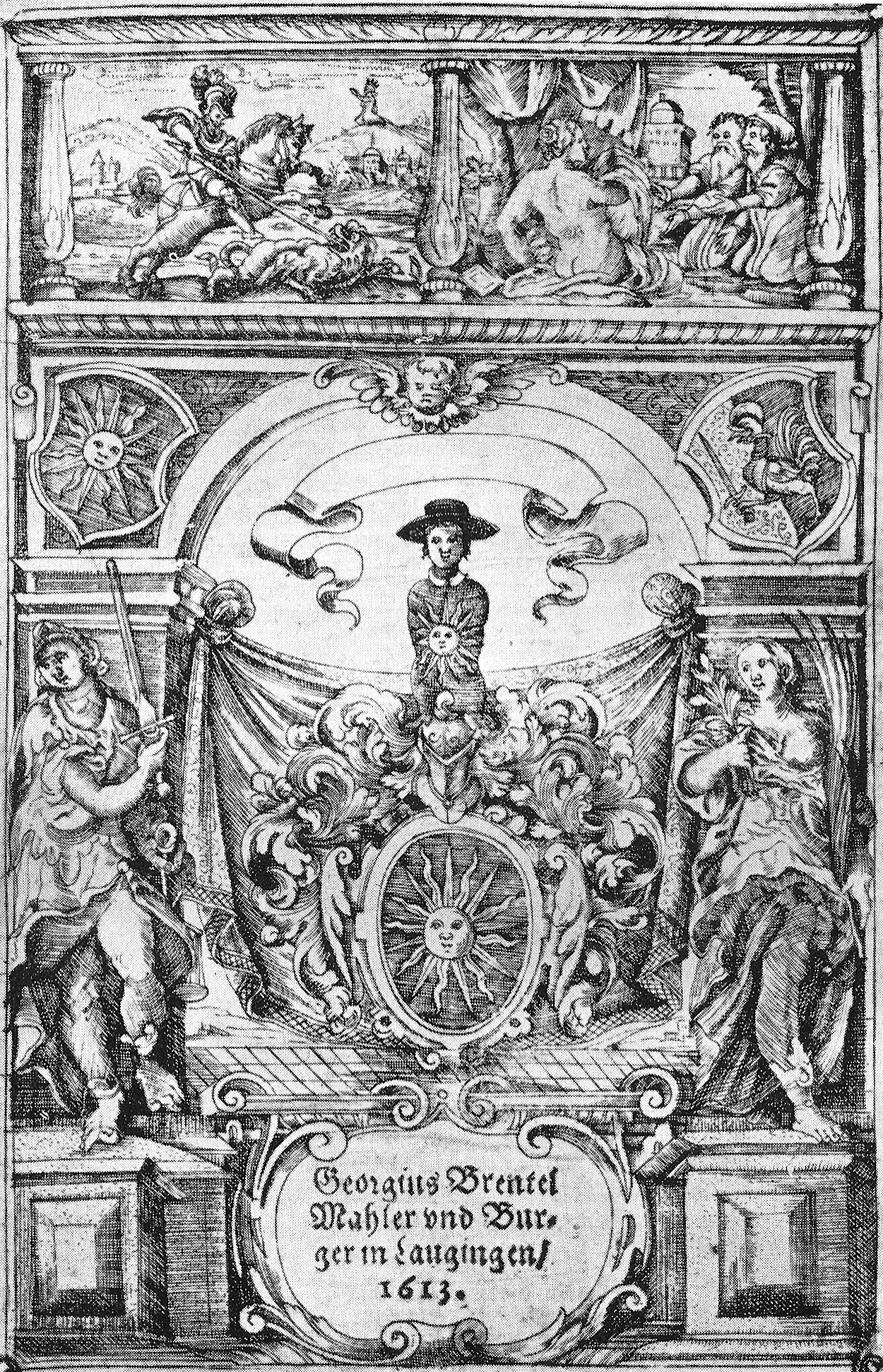 Exlibris von Georg Brentel (Kupferstich mit dem Schriftzug: „Georgius Brentel / Mahler und Bur- / ger in Laugingen/ / 1613.“)